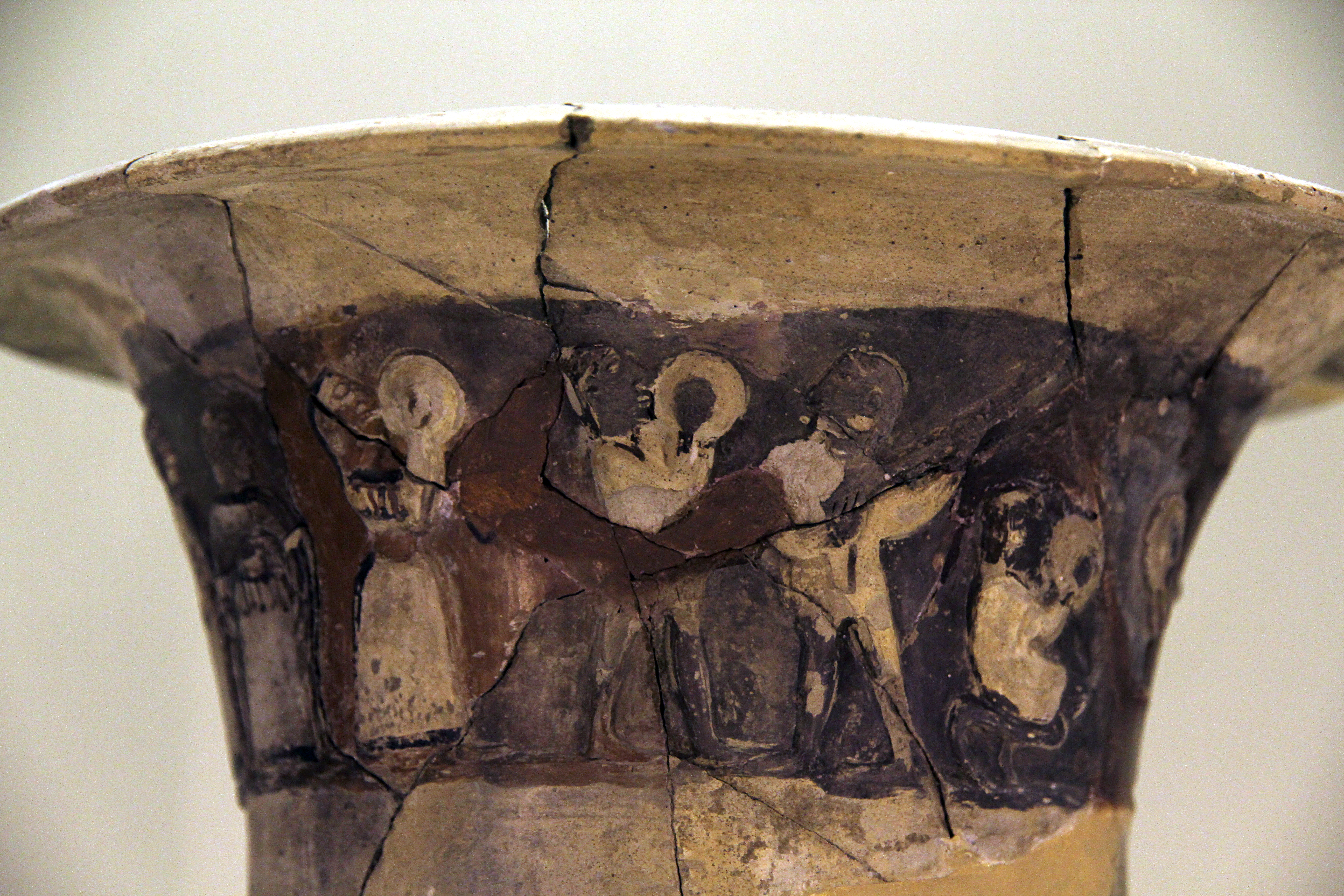 Archäologisches Museum Çorum, Zentraltürkei, frühhethitische Vase B aus Hüseyindede, Musikanten und Tänzerinnen